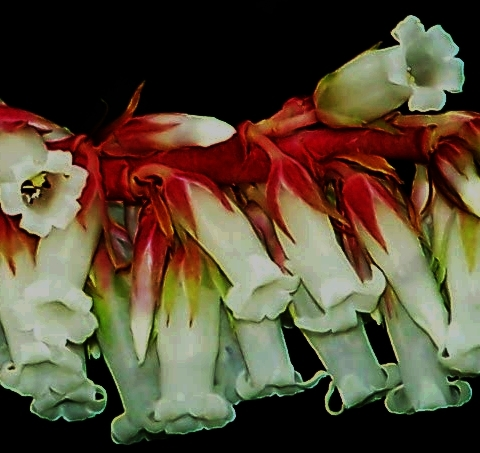 Dracophyllum secundum, Einseitswendiges Drachenbaumblatt, Subfamilia Styphelioideae, SO-Australien, Botanischer Garten Berlin